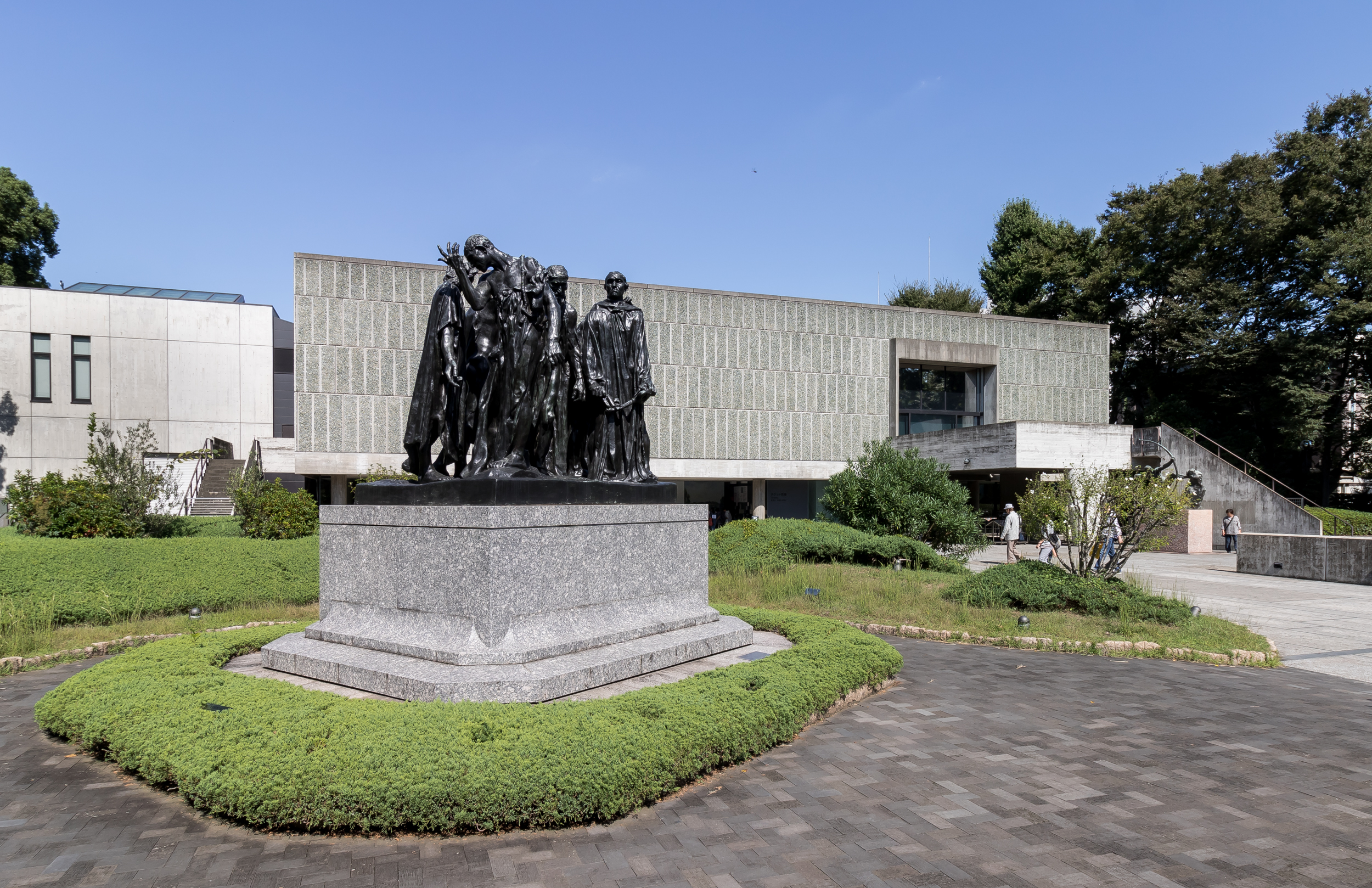 国立西洋美術館(東京都台東区)。「カレーの市民」